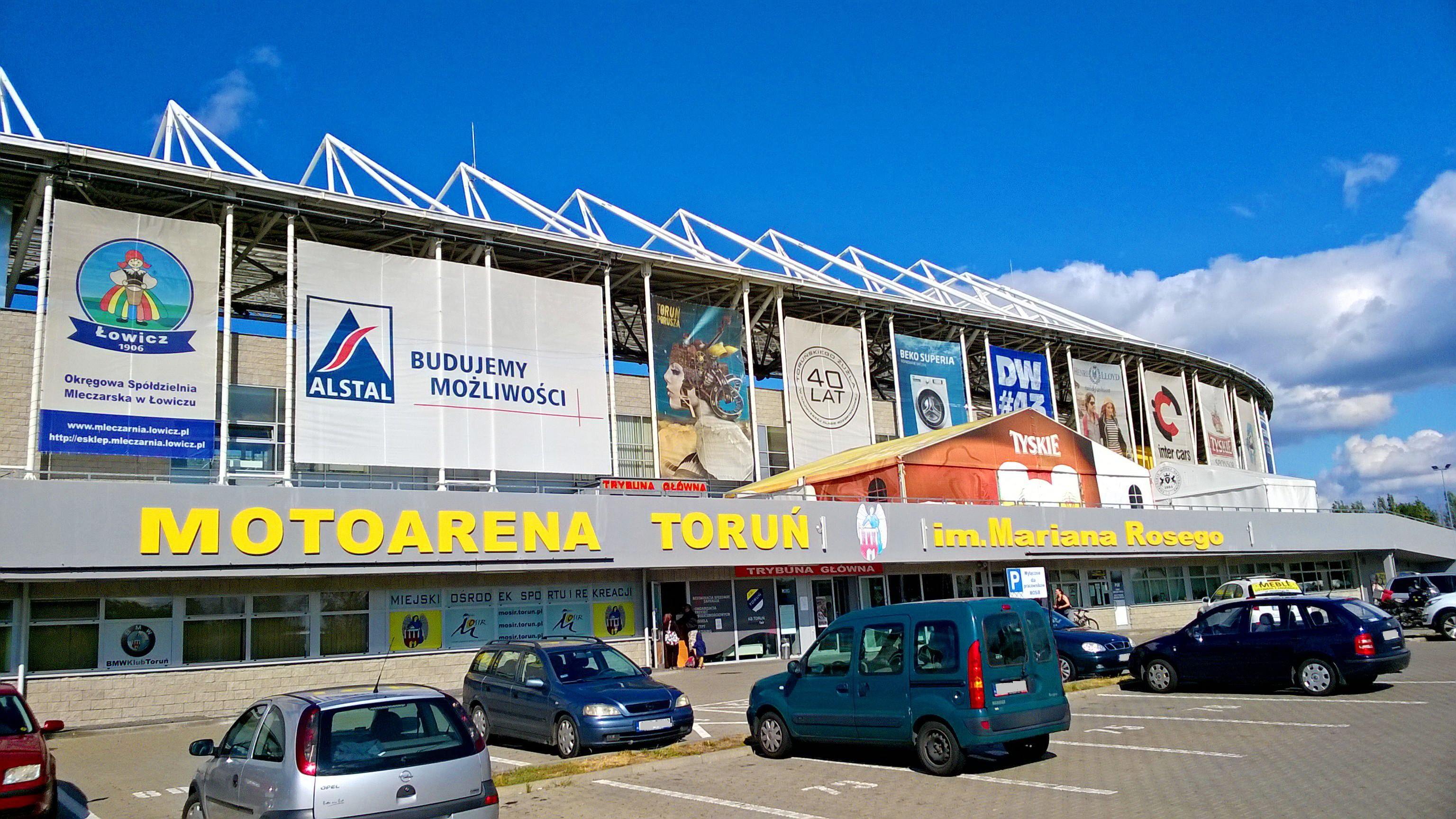 Motoarena Toruń1